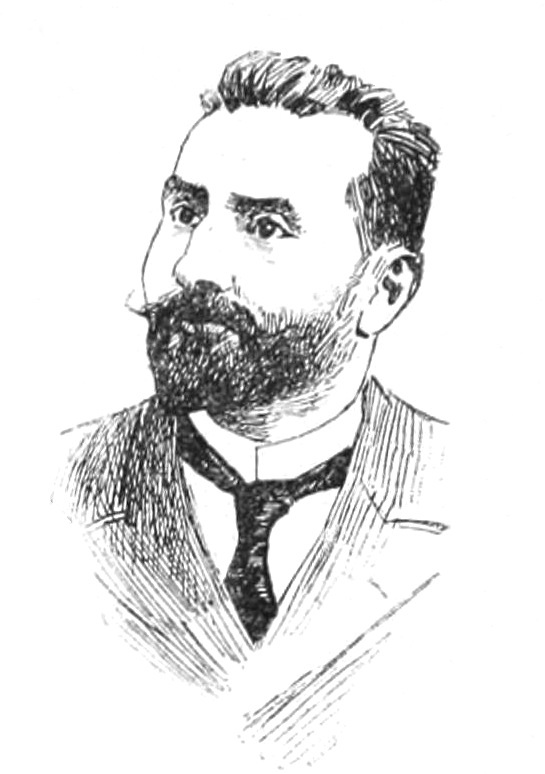 "La Nouvelle Chambre" : "Cadenat".